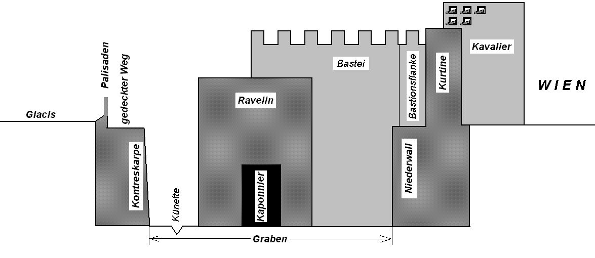 Festungsquerschnitt der Stadtmauern Wiens von 1548 bis 1872